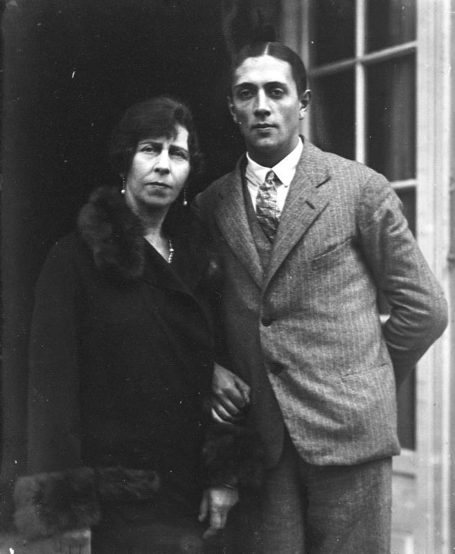 Frau Zoubkoff, geb. Prinzessin Victoria von Preussen die Schwester des Exkaisers, hat beim Landgericht in Bonn die Scheidungsklage gegen Alexander Zoubkoff einreichen lassen. Als Hauptgrund für die Scheidung wird angegeben, dass ihr Gatte durch sein Verhalten eine vollkommne Zerrüttung der Ehe herbeigeführt hat. Frau Zoubkoff, geborene Prinzessin Victoria von Preussen und ihr Gatte Alexander Zoubkoff, aufgenommen in den ersten Tagen ihrer Ehe.